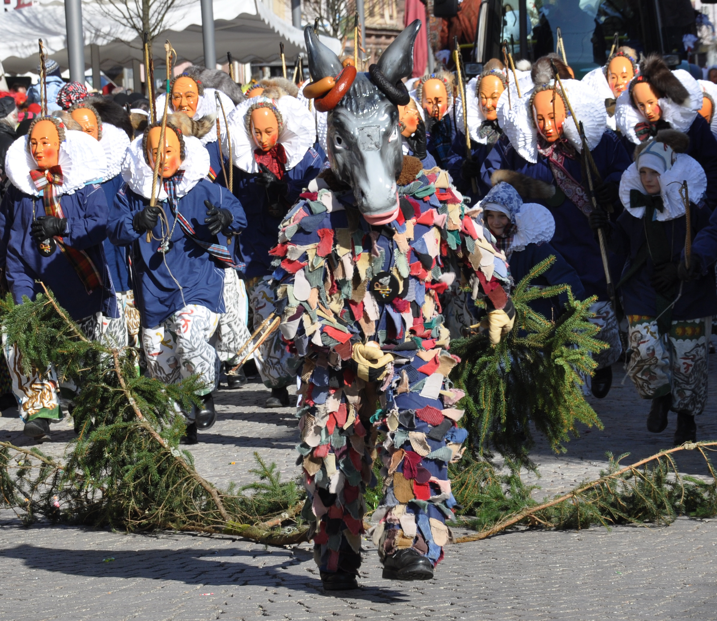 Historischer Umzug der Narrozunft Villingen, Fasnetsmontag 2011 Butzesel und Triiber (Stachis)